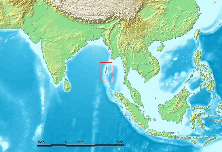 Andaman Islands